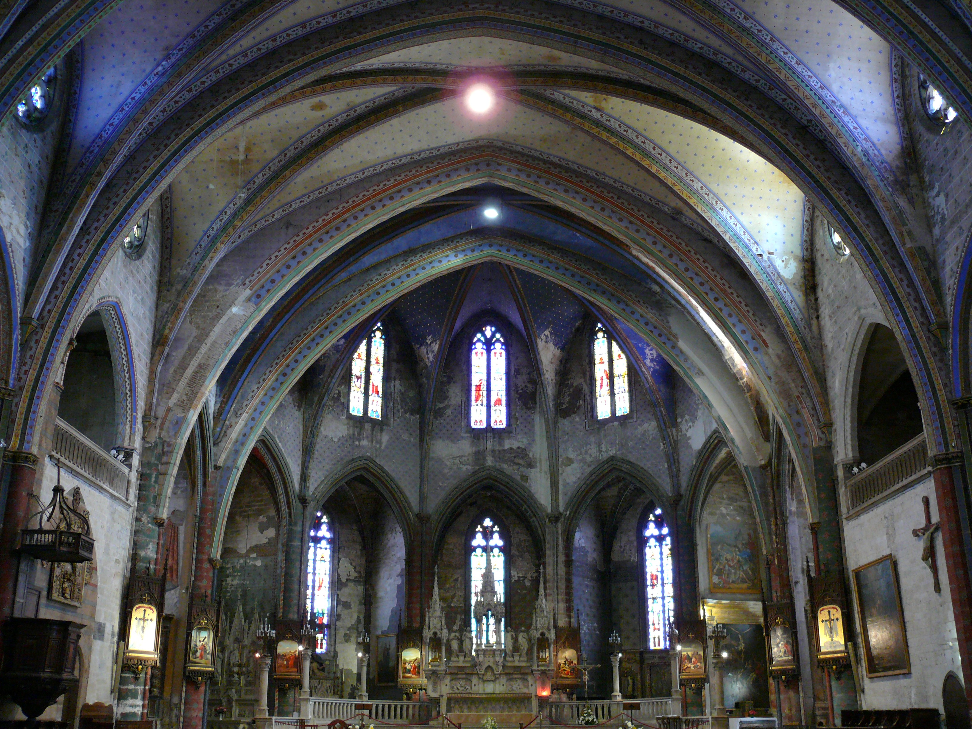 Mirepoix - Ancienne cathédrale - Nef